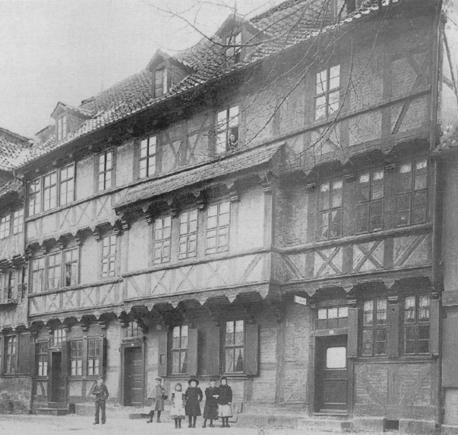 Marktkirchhof 7-9, Quedlinburg um 1900, Ausschnitt aus einer Fotografie